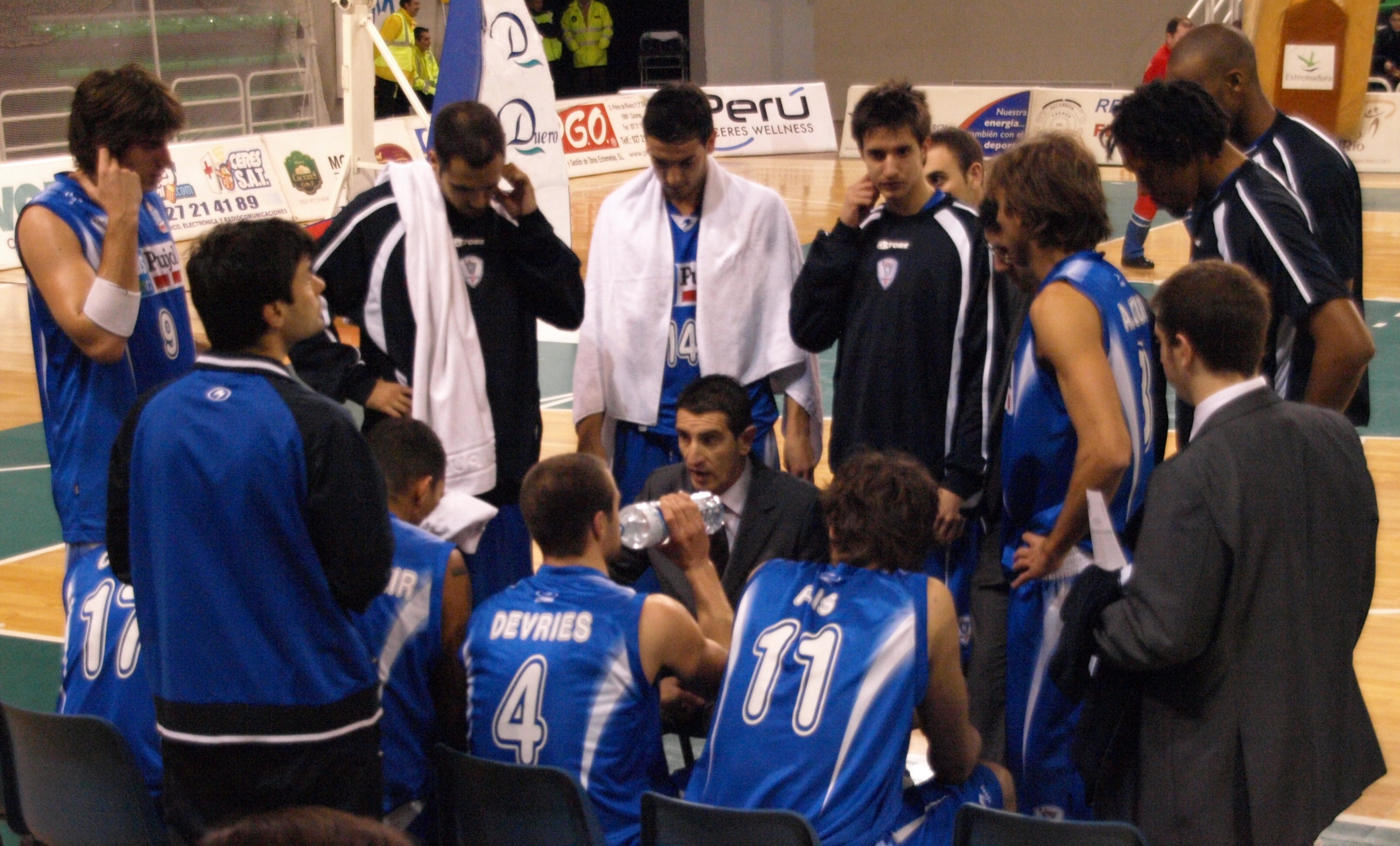 Plantilla y cuerpo técnico del Plus Pujol Lleida durante un tiempo muerto del partido de liga LEB de la temporada 2008/09 disputado en el Pabellón Multiusos de Cáceres ante el Cáceres 2016 Basket